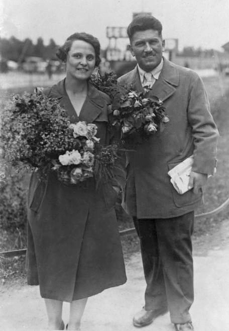 ADN-ZB Hölz, Max, geb. 14.10.1889 Moritz b. Riesa, gest. 18.9.1933 bei Gorki Revolutionär mit anarchistischen Tendenzen. UBz.: M. Hölz mit seiner Frau. 22135-28 1928